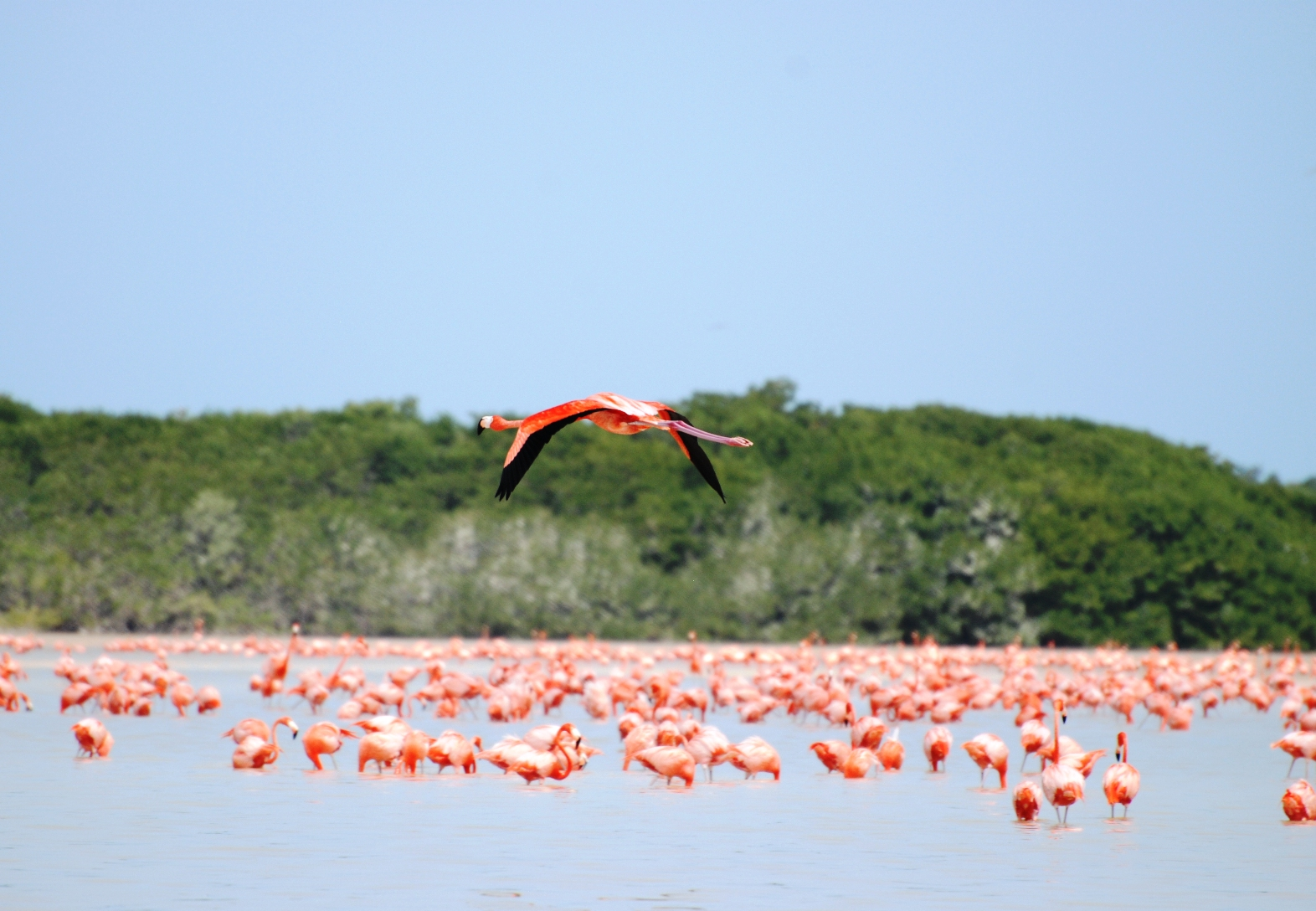 Kubaflamingo Phoenicopterus ruber Kolonie, Celestún Nationalpark, Yucatan, Mexiko